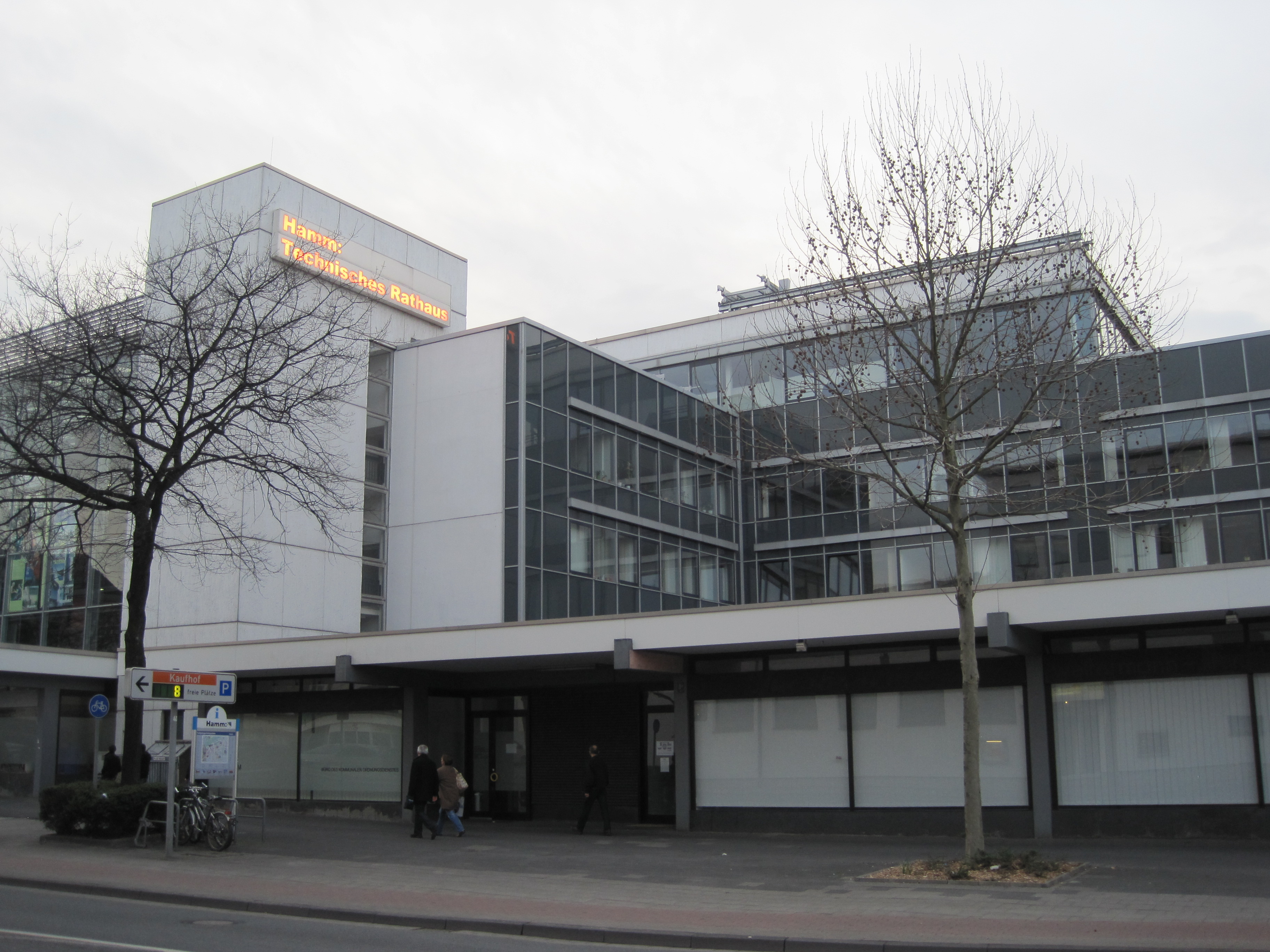 Das Foto zeigt das Technische Rathaus von Hamm mit Blick von der Seite.